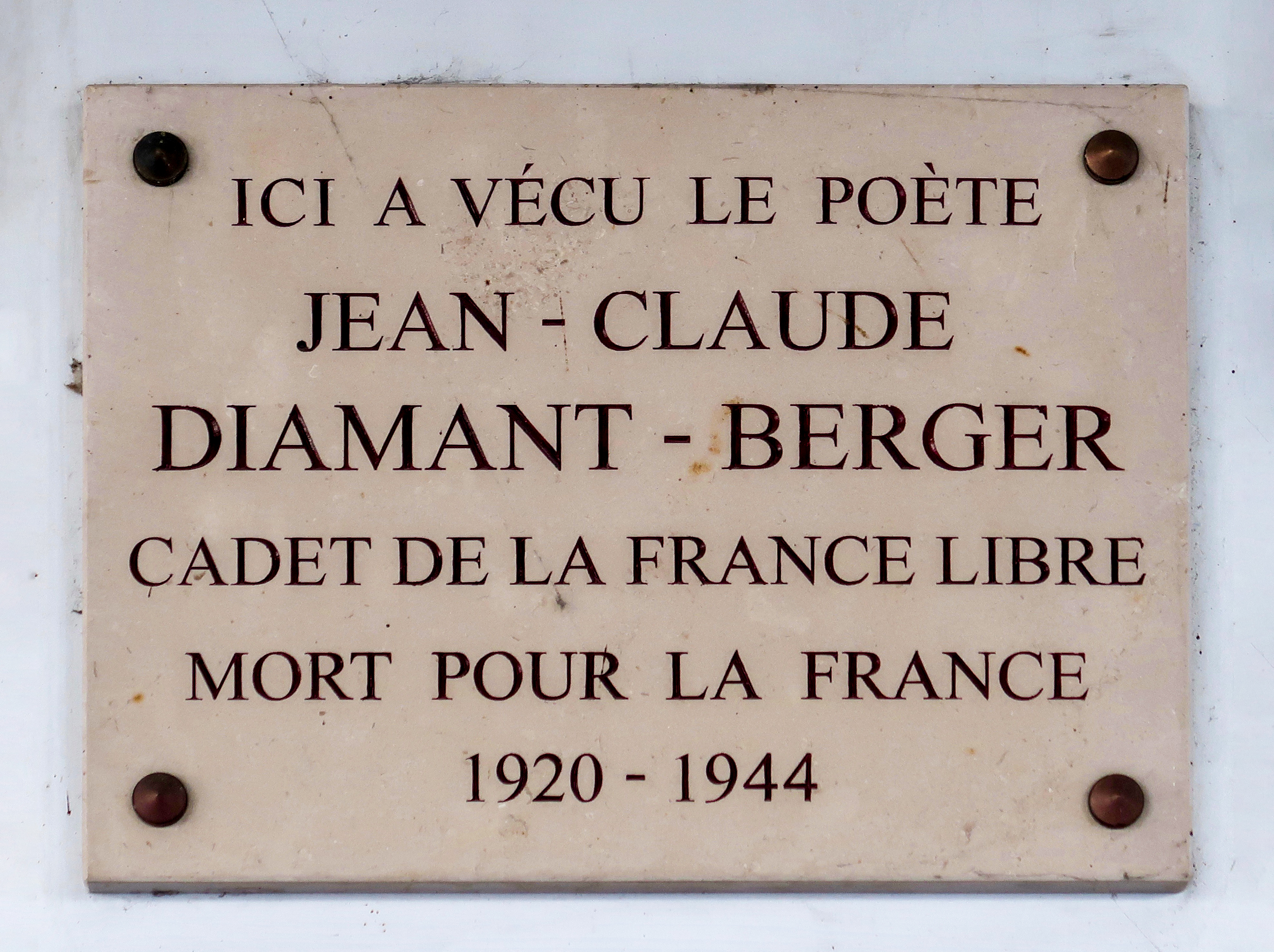 Plaque en hommage à Jean-Claude Diamant-Berger, 288 rue Saint-Jacques (Paris, 5e).